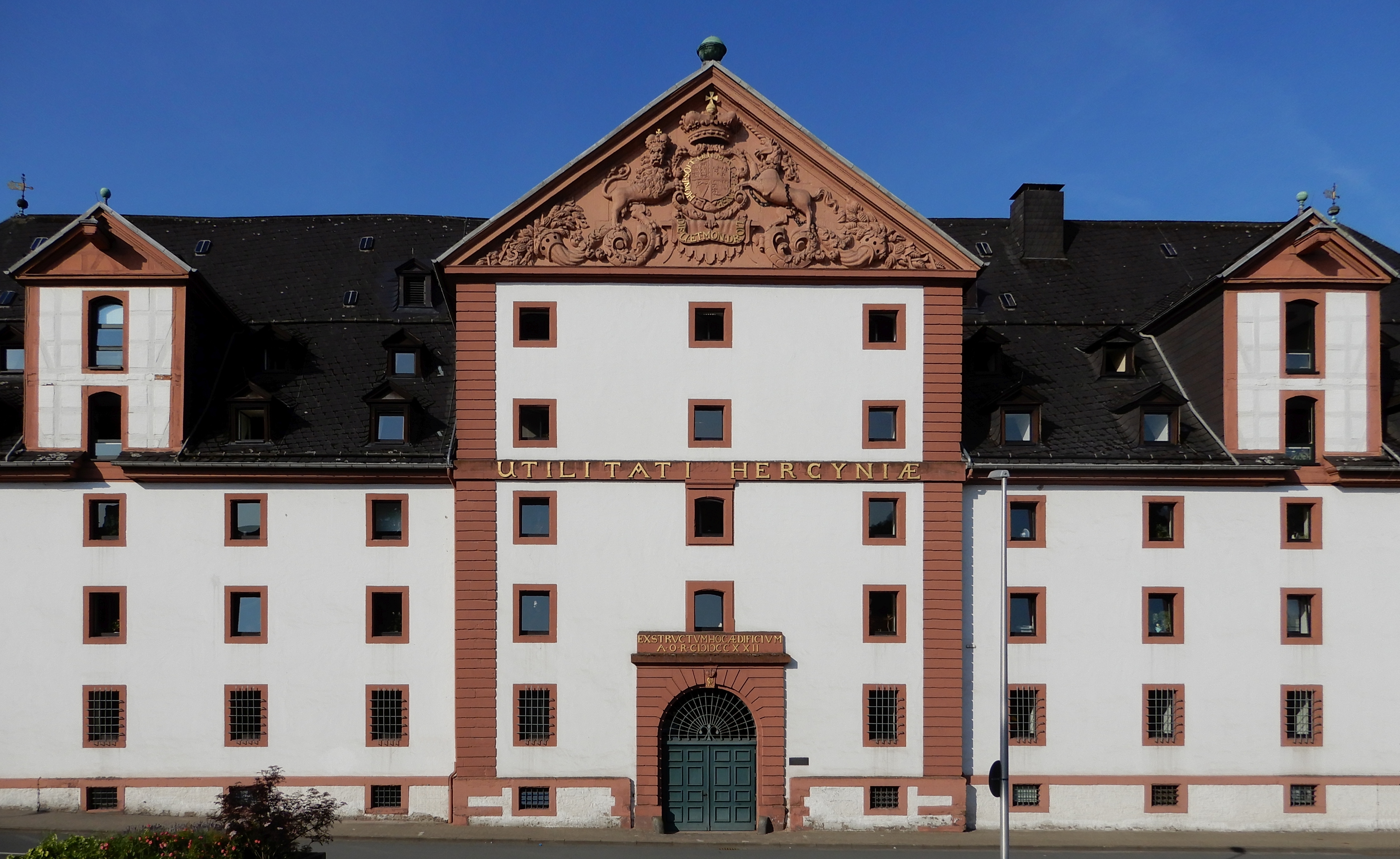 Das Harzkornmagazin in Osterode am Harz, seit 1989 als Rathaus der Stadt genutzt. Frontale Ansicht.